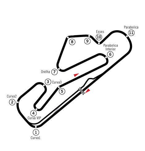 Tracciato di Estoril nella forma esistente tra il 1984 e il 1993